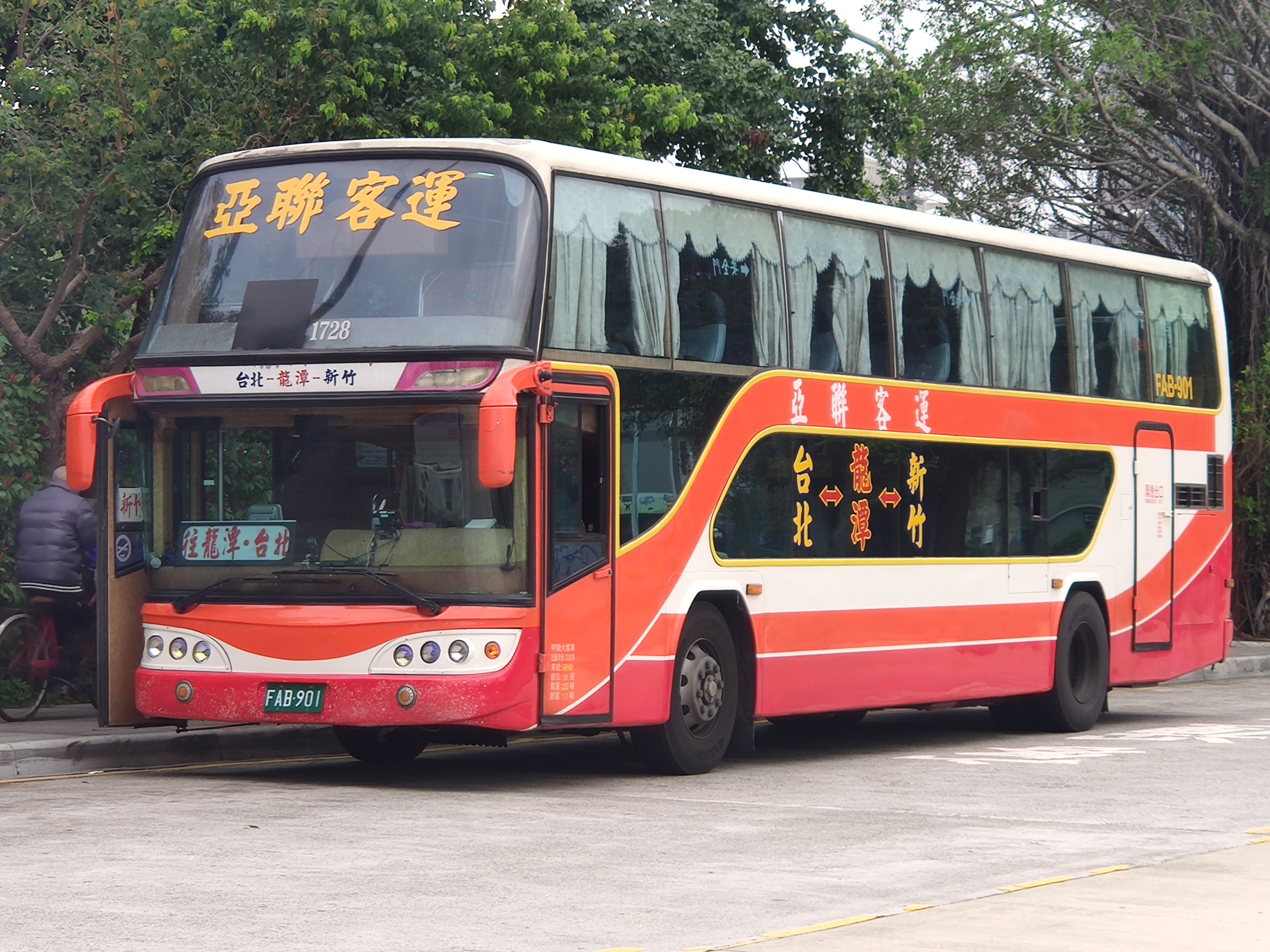 亞聯客運 FUSO RP517PL大客車 FAB-901